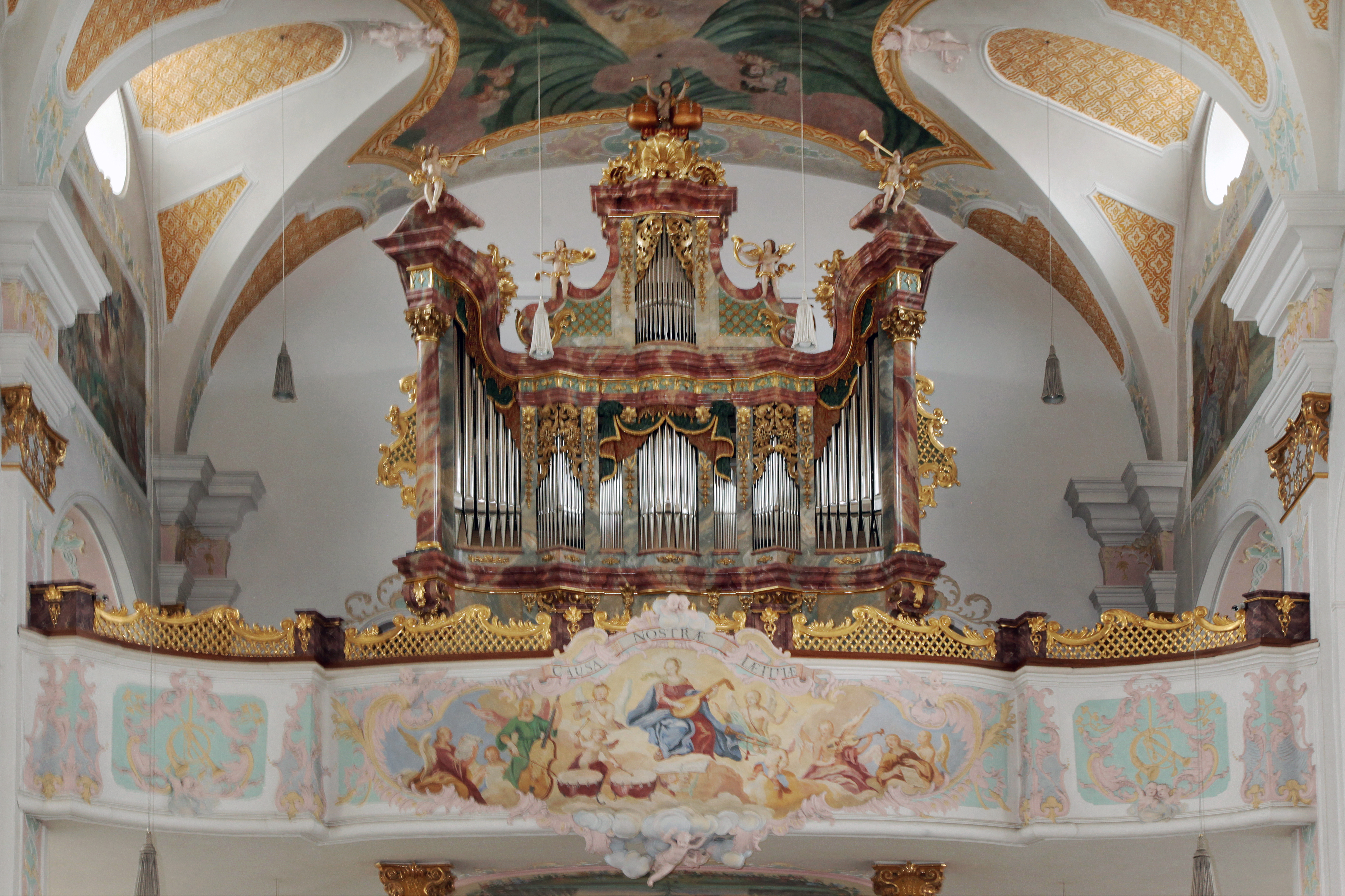 Neubau mit vorhandenem Gehäuse